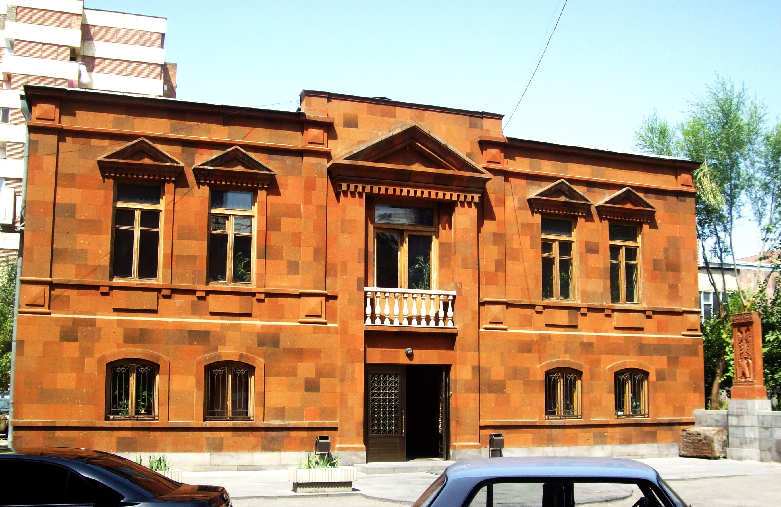 Araratian Pontifical Diocese